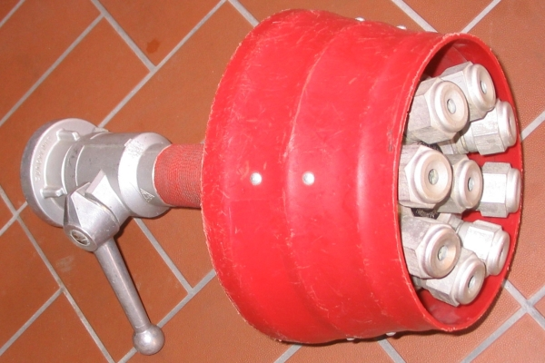 Monsunstrahlrohr (Brausekopfrohr) der FF Holtsee